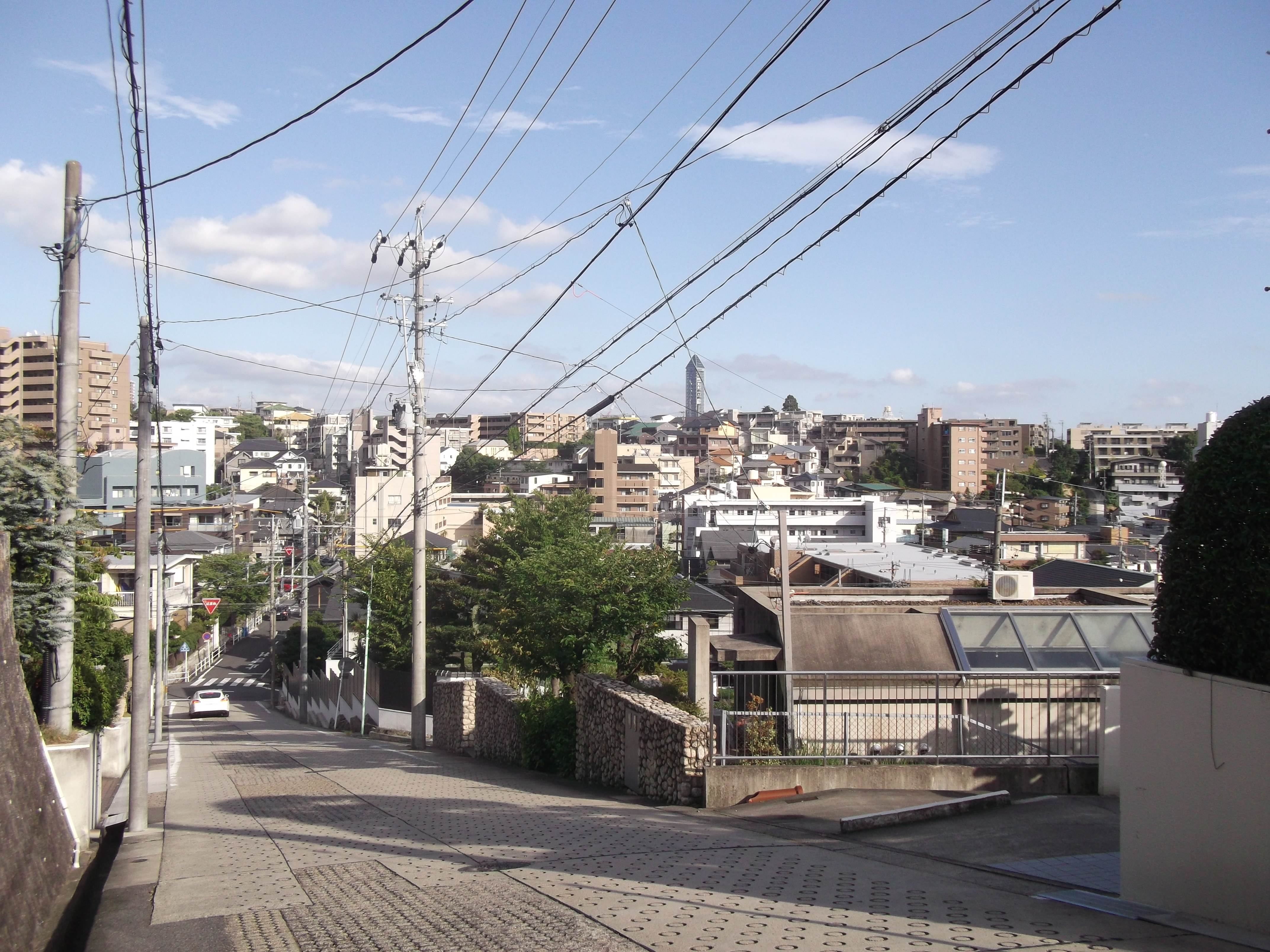 名古屋市千種区日和町の日和山から東側を撮影